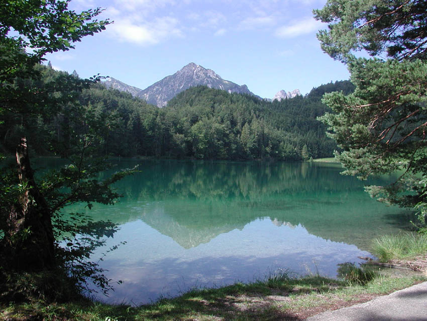 Vils Tirol Alatsee mit Rossberg